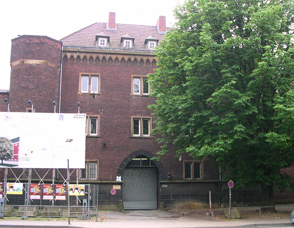 Aachen, alte Justizvollzugsanstalt am Adalbertsteinweg, heute Gericht.